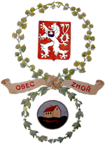 Znak, který je nakreslen na úvodní stránce kroniky.